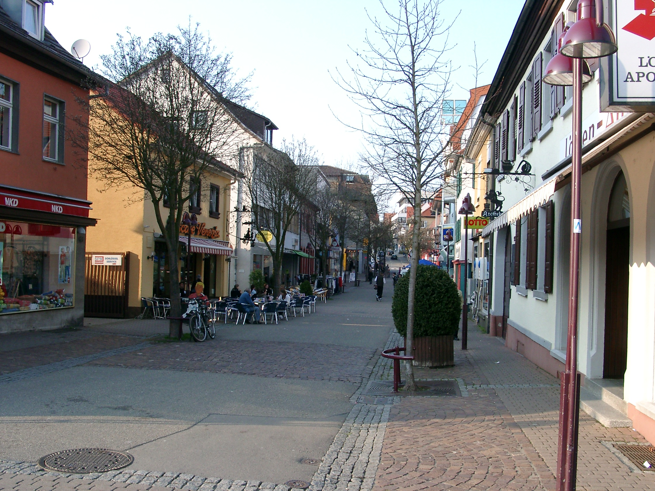 Wiesloch, Blick in die Fußgängerzone